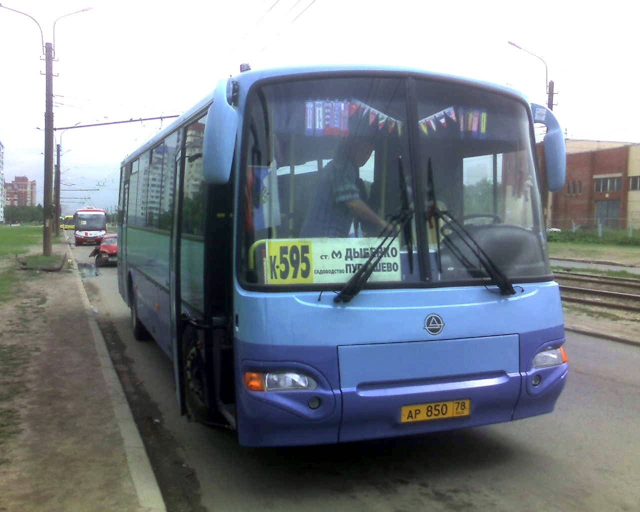 Автобус КАвЗ-4238 ООО "Гортранс" в Санкт-Петербурге. - Bus KAvZ-4238 OOO "Gortrans", St. Petersburg